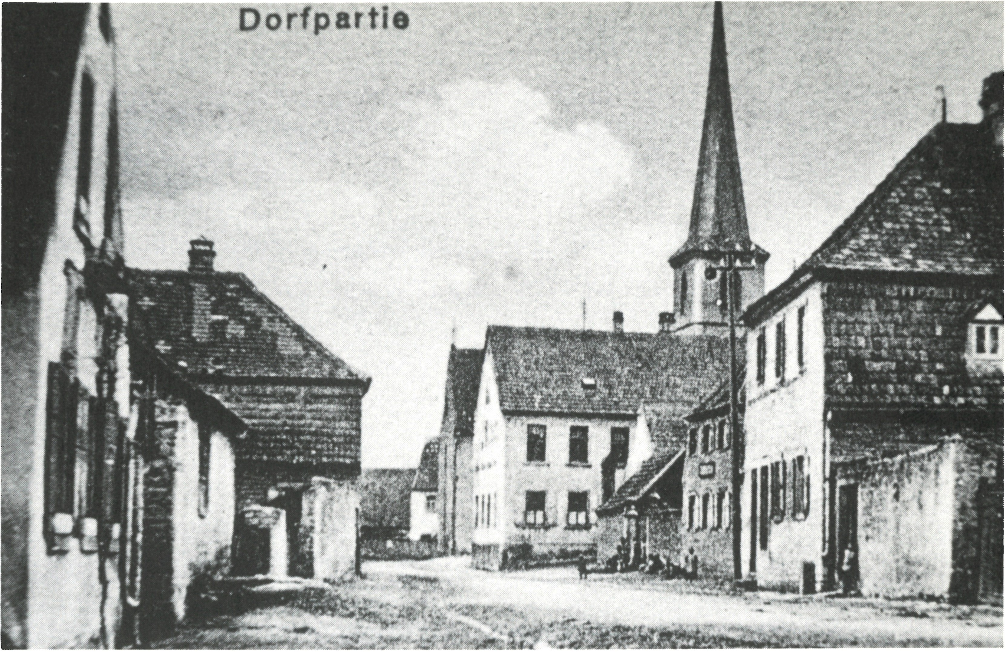 Postkarte: Gerlachshausen 1914. Dorfstraße, Volksschulgebäude vor der Kirche